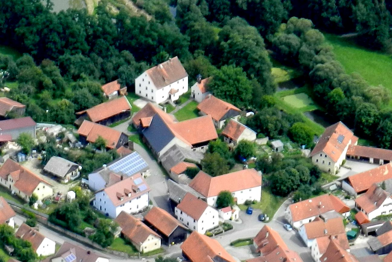 Ortskern Fronhof mit Kapelle. Hier stand früher die Burganlage. Fronhof gehört zur Gemeinde Altendorf im Landkreis Schwandorf, Oberpfalz, Bayern (2011)